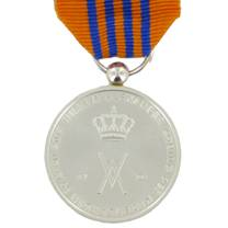 Inhuldigingsmedaille 2013, achterzijde.